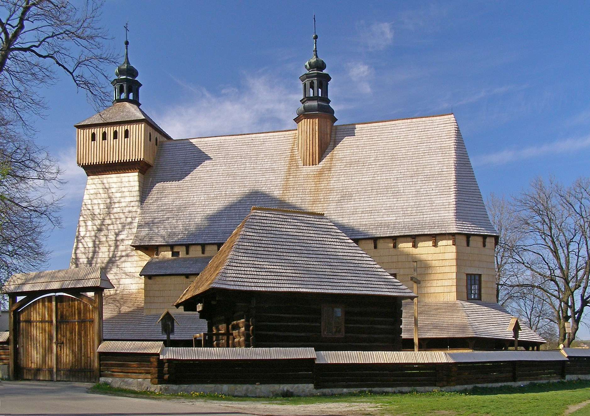 wieś Haczów